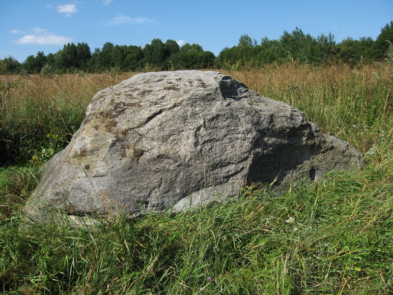 Жвірблішкі. Валун «Жвірблішкінскі»